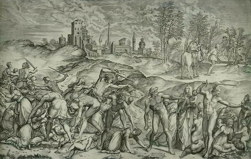 Pokolj nevine dječice